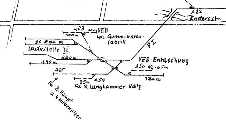 Ausschnitt aus dem Gleisplan des Bahnhofs Leipzig-Plagwitz für den Bereich des heutigen Henriettenparks